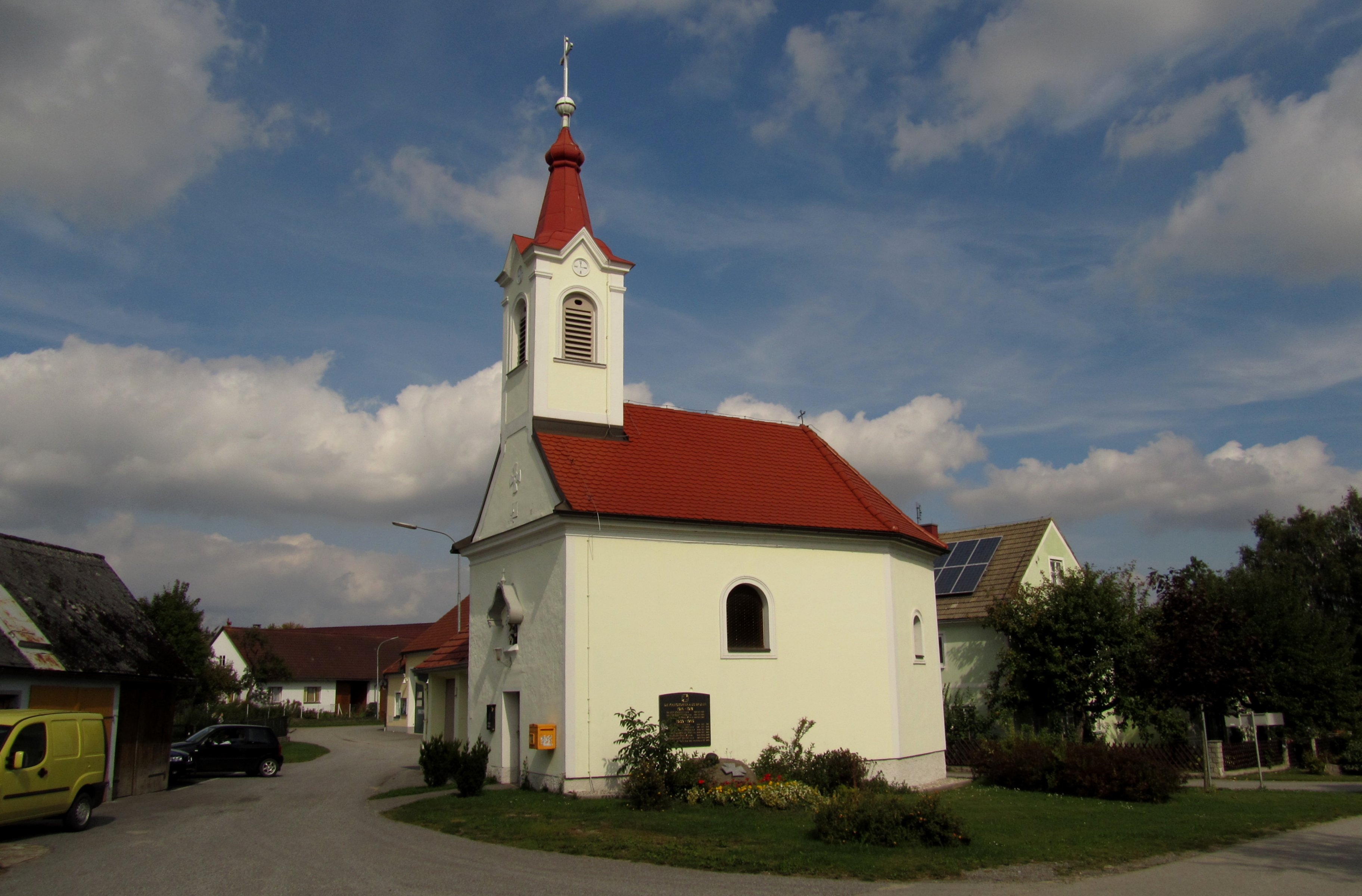 Ortskapelle Brunn